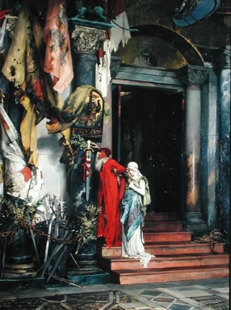 « L'amiral Carlo Zeno » peinture d'Albert Maignan, 1878. Huile sur toile, 1,720 m x 1,320 m. Lille, Palais des Beaux-Arts.